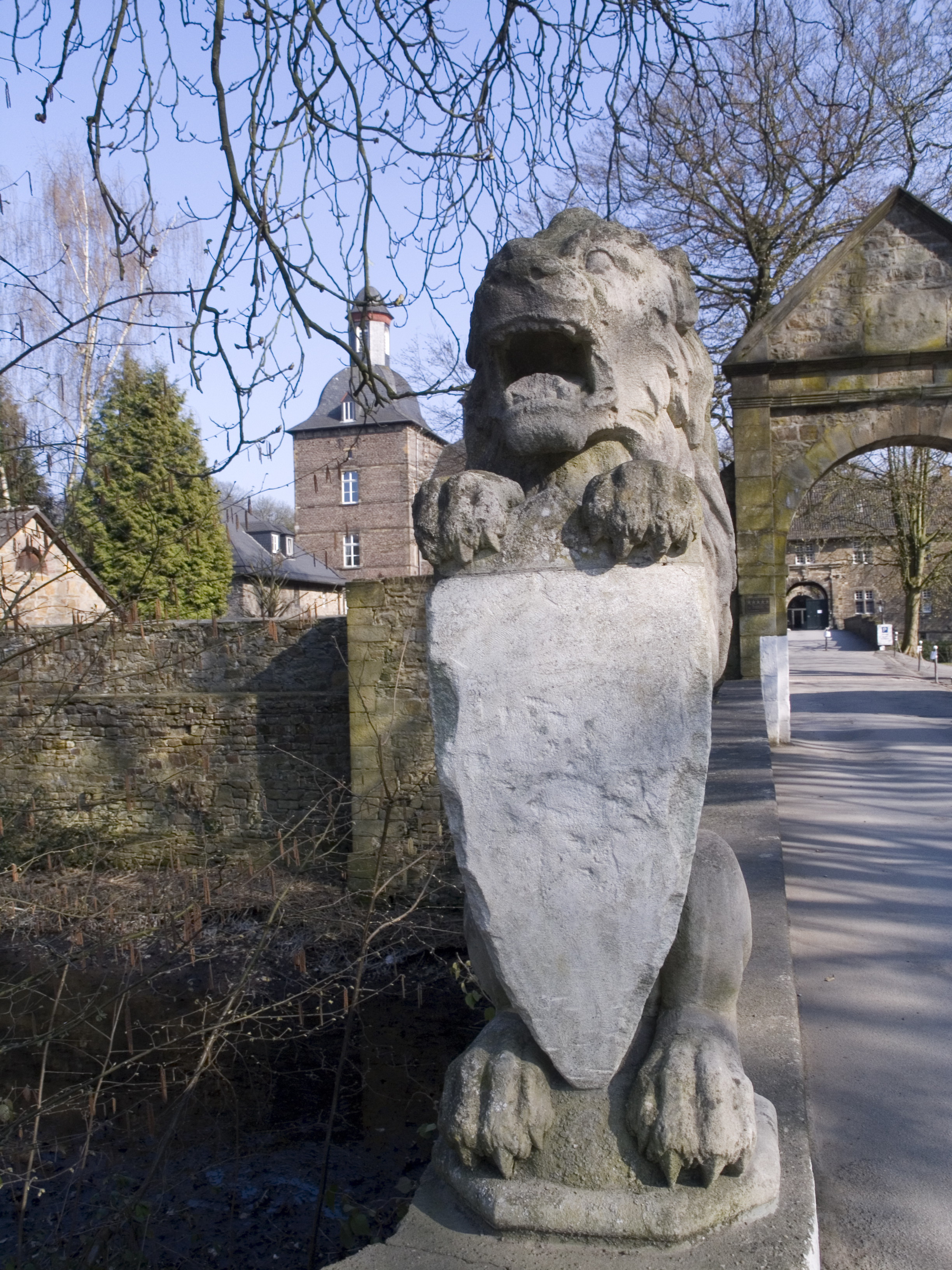 Северный Рейн - Вестфалия, Эссен, Кеттвиг - замок Гугенпот (въездные ворота)